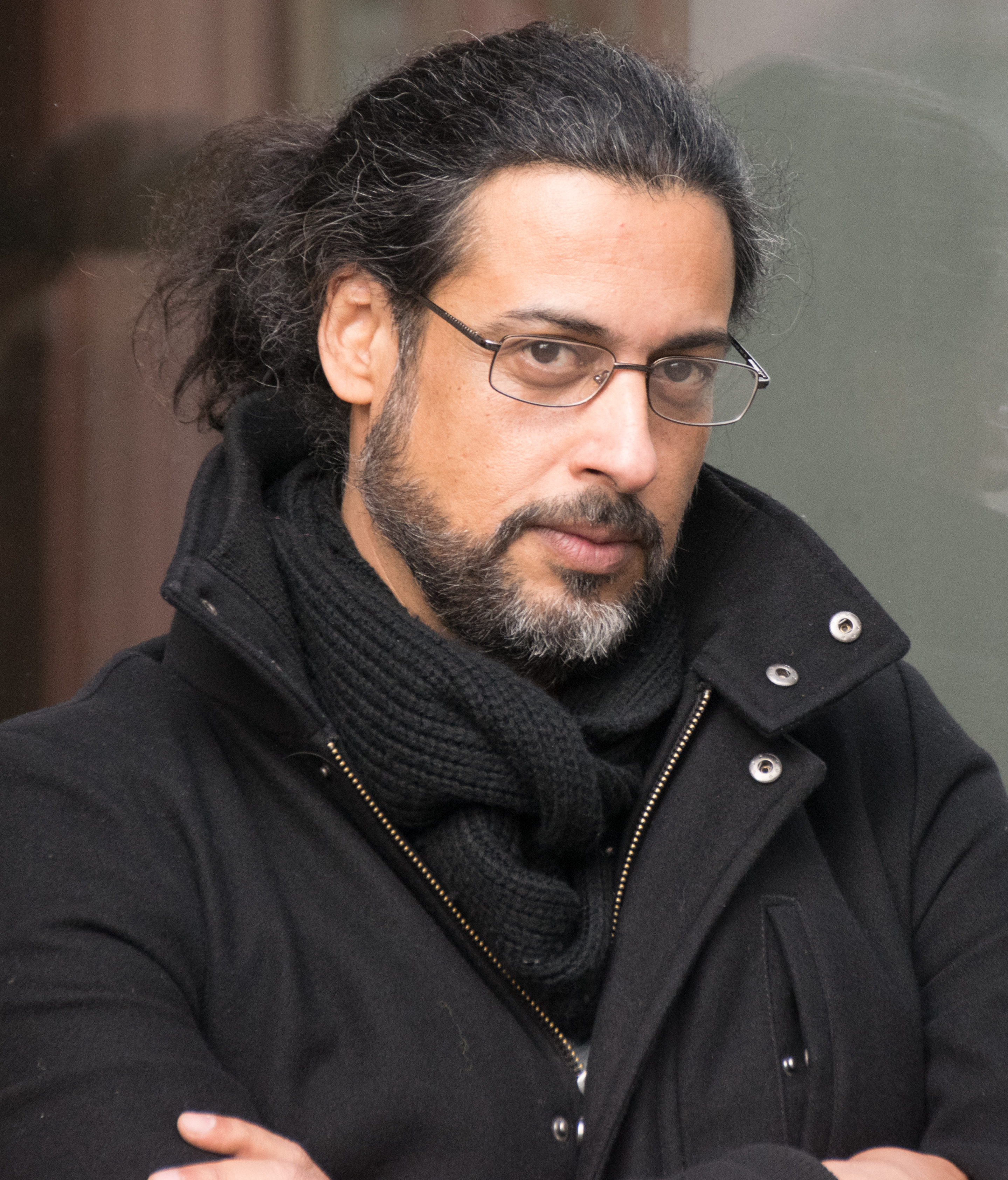 Abbas Khider, Mainzer Stadtschreiber am 7. März 2017 im Gutenberg Museum